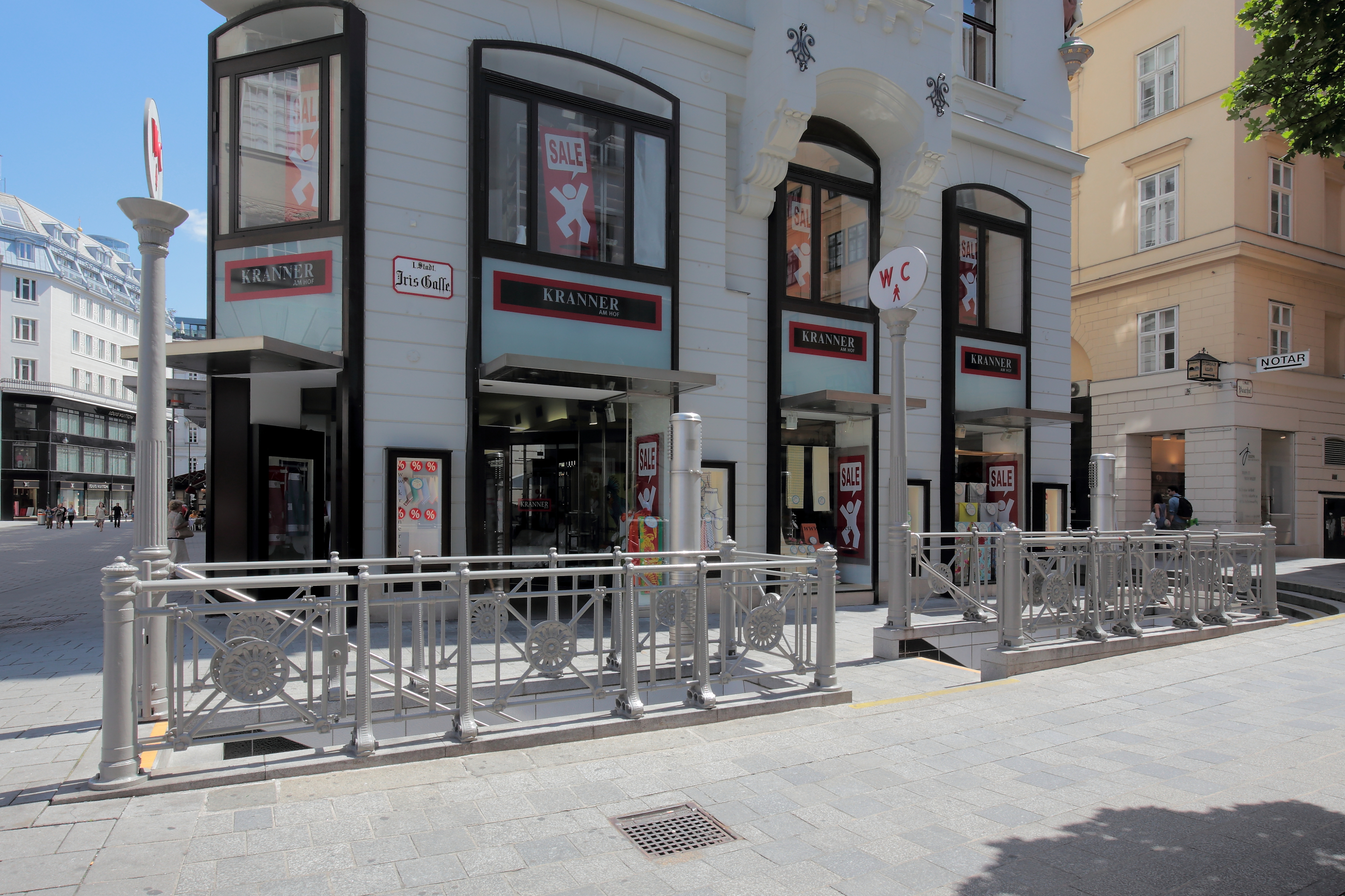 Öffentliche Toilettenanlage in der Irisgasse im 1. Wiener Gemeindebezirk Innere Stadt.Diese öffentliche, unterirdische Bedürfnisanstalt wurde von der Firma Wilhelm Beetz im Jahr 1939 in der Irisgasse, die mit 17,5 Metern die kürzeste Straße Wiens ist, errichtet.